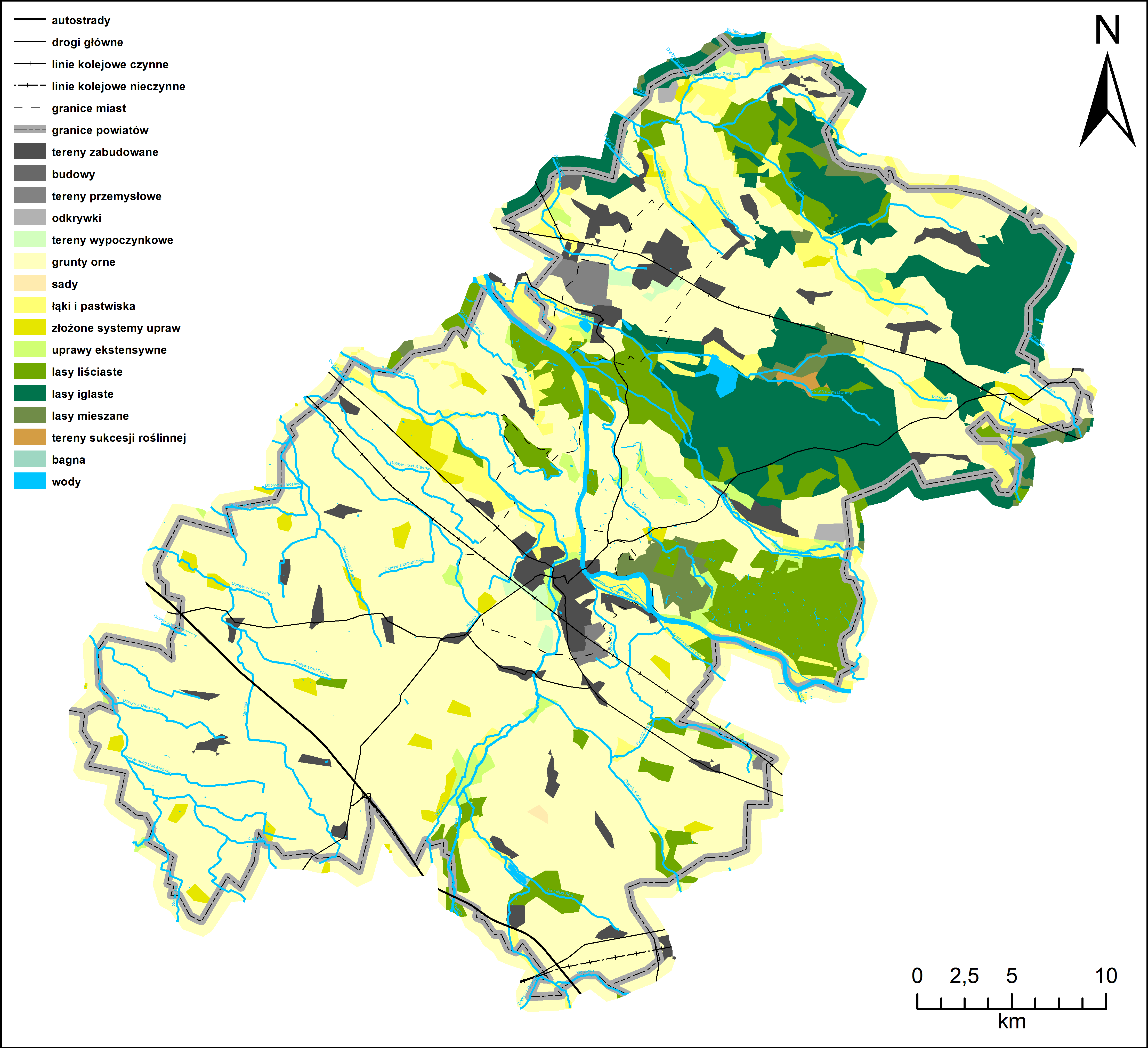 Pokrycie terenu powiatu oławskiego w 2006 roku